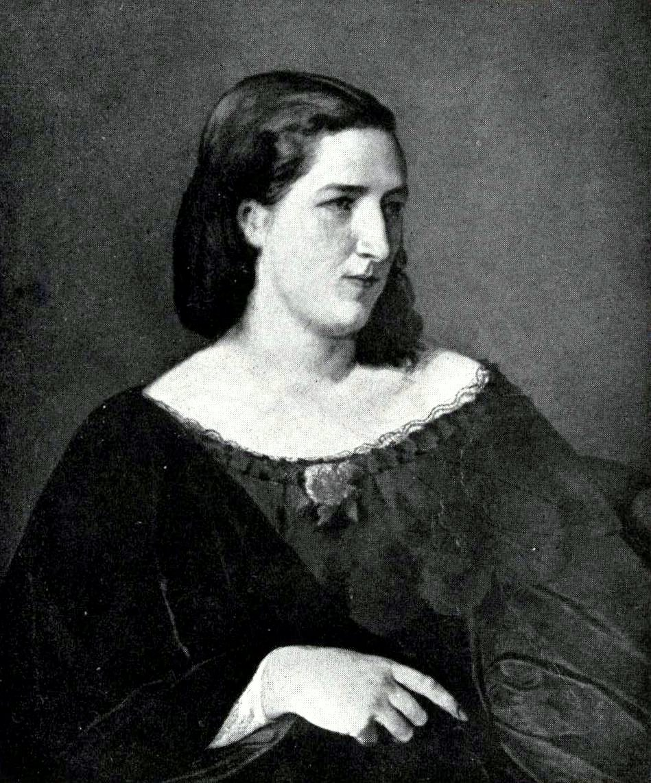 Gemälde der Schriftstellerin und Journalistin Rosalie Braun-Artaria von Anselm Feuerbach aus dem Jahr 1860.